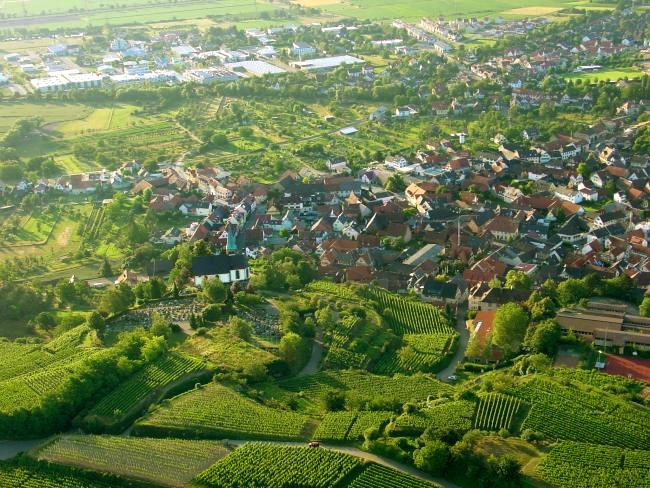 Luftbild von Bahlingen aufgenommen bei einer Ballonfahrt